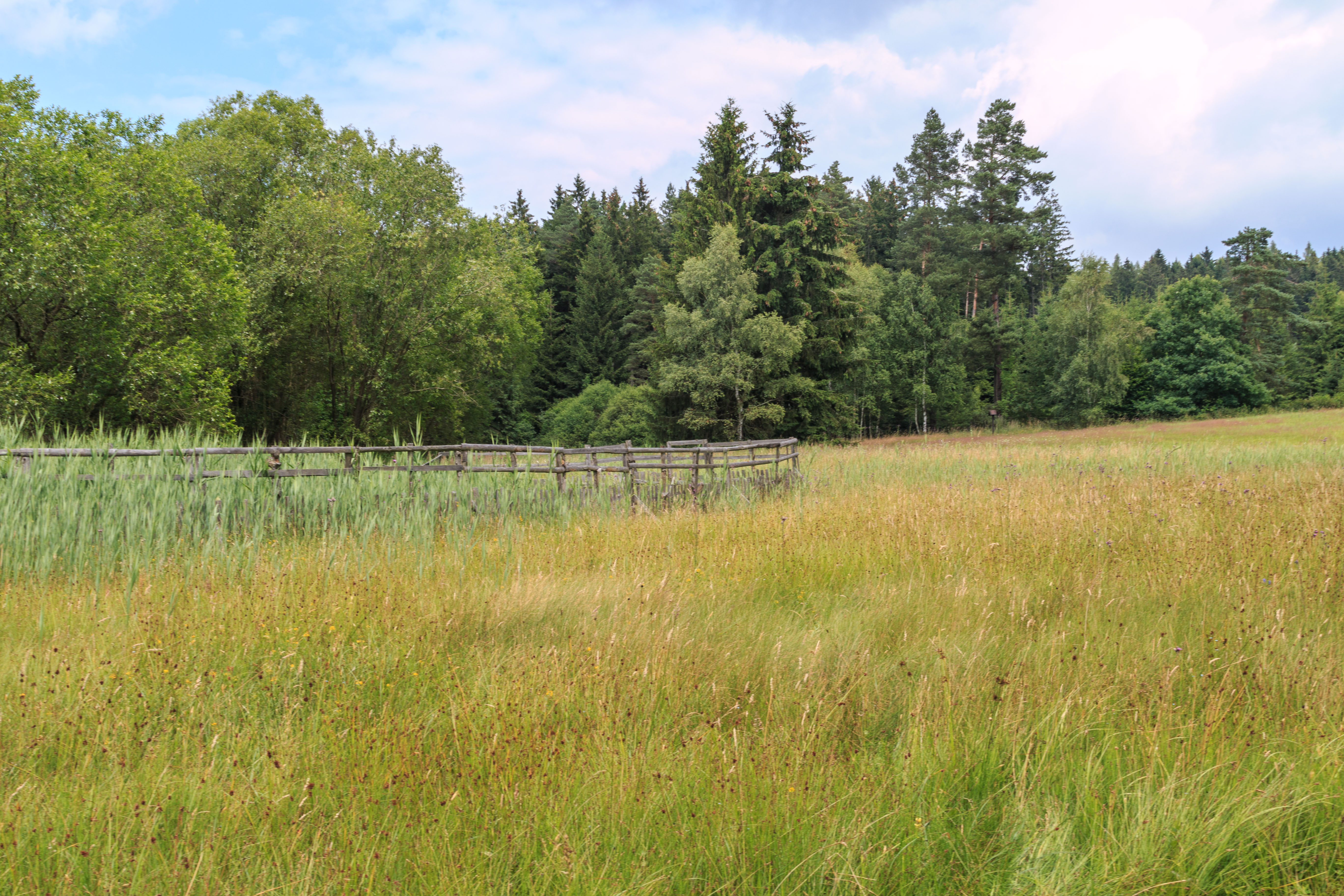 PP Úpolíny u Kamenice Project: Chráněná území.